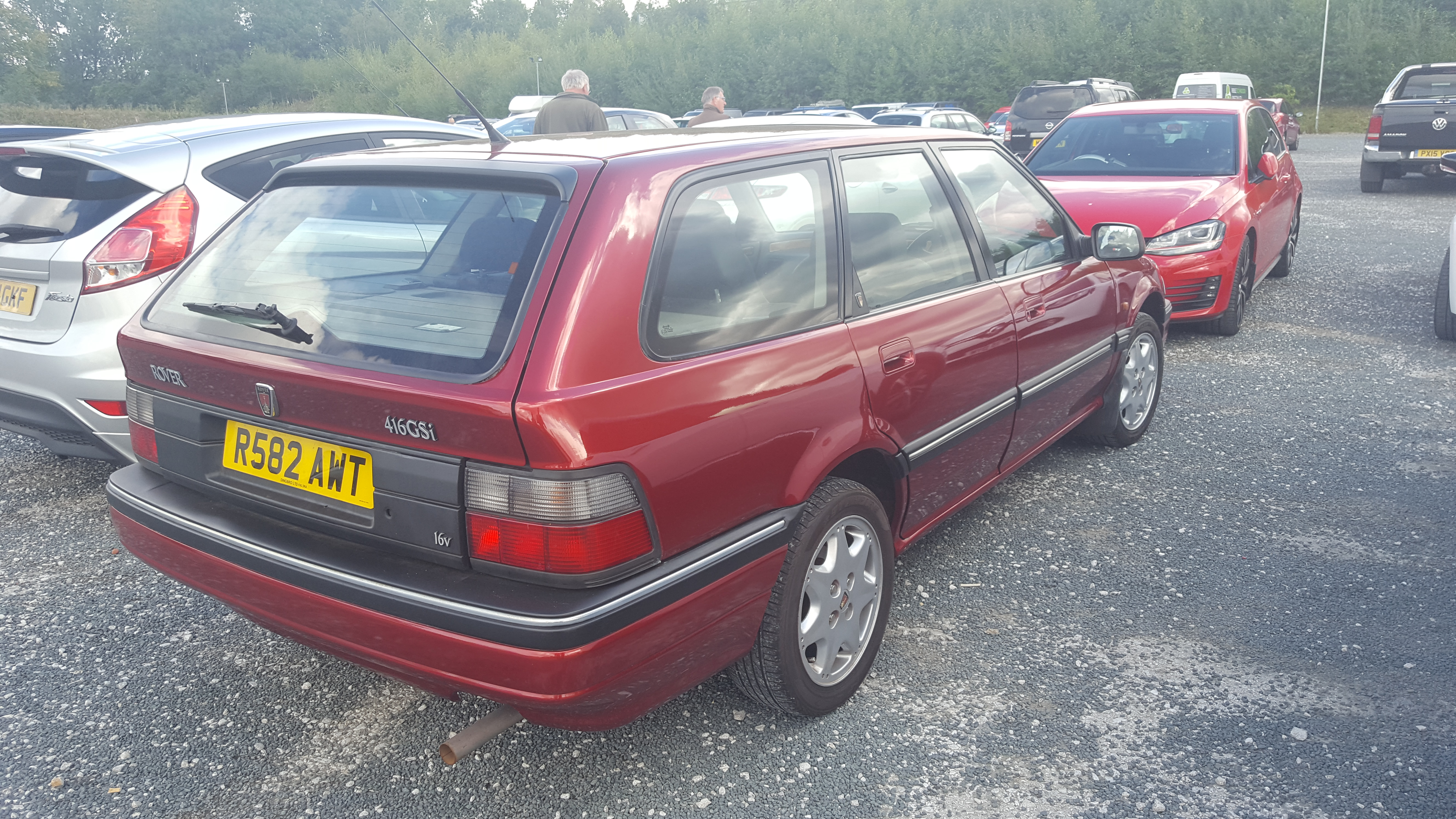 1997 Rover 416 Tourer